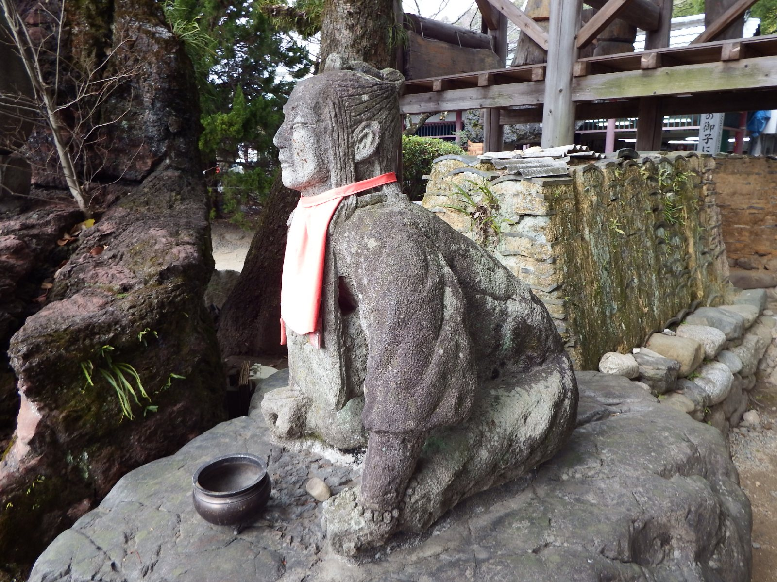 石手寺の衛門三郎